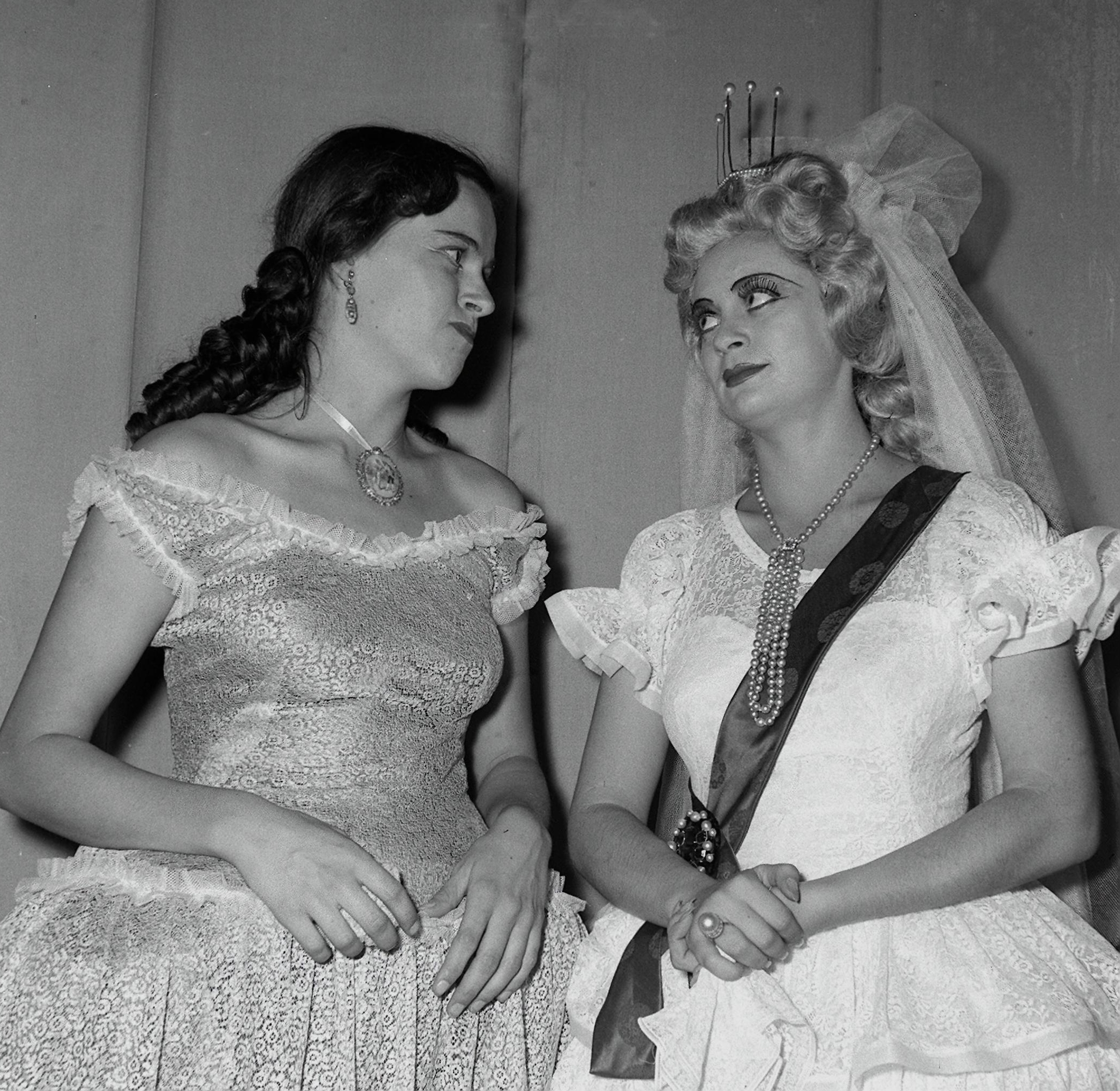 TWO ACTRESSES OF THE HABIMATHEATRE, HANA MERON (R) AND ORNA PORAT. שחקניות תיאטרון הבימה, חנה מרון ואורנה פורת